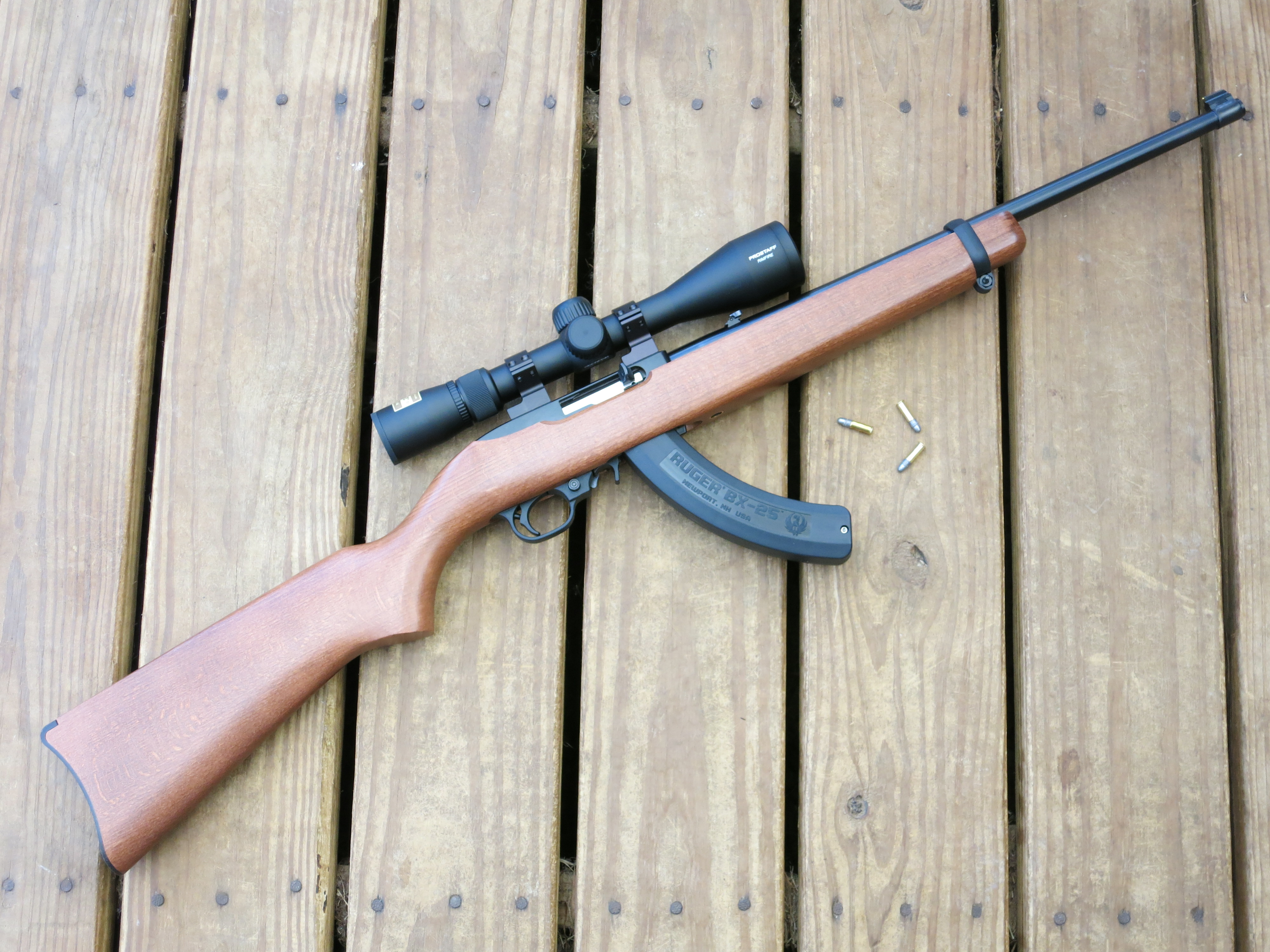 .22 LR Semi-Auto Rifle